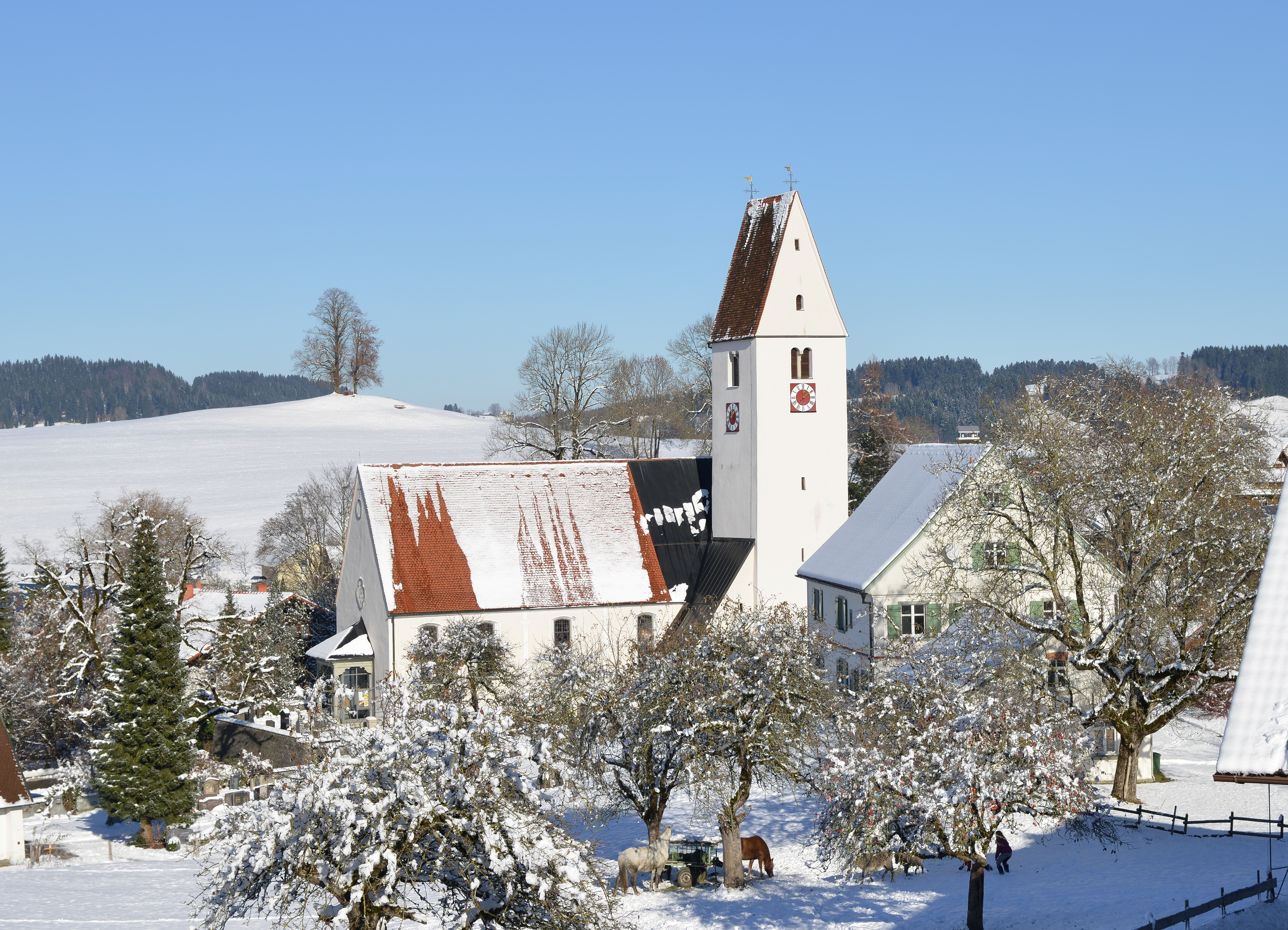 Katholische Pfarrkirche St. Otmar in Grünenbach, Turm um 1400, eingezogener, dreiseitig geschlossener Chor und Langhaus Ende 17. Jahrhundert; mit Ausstattung.